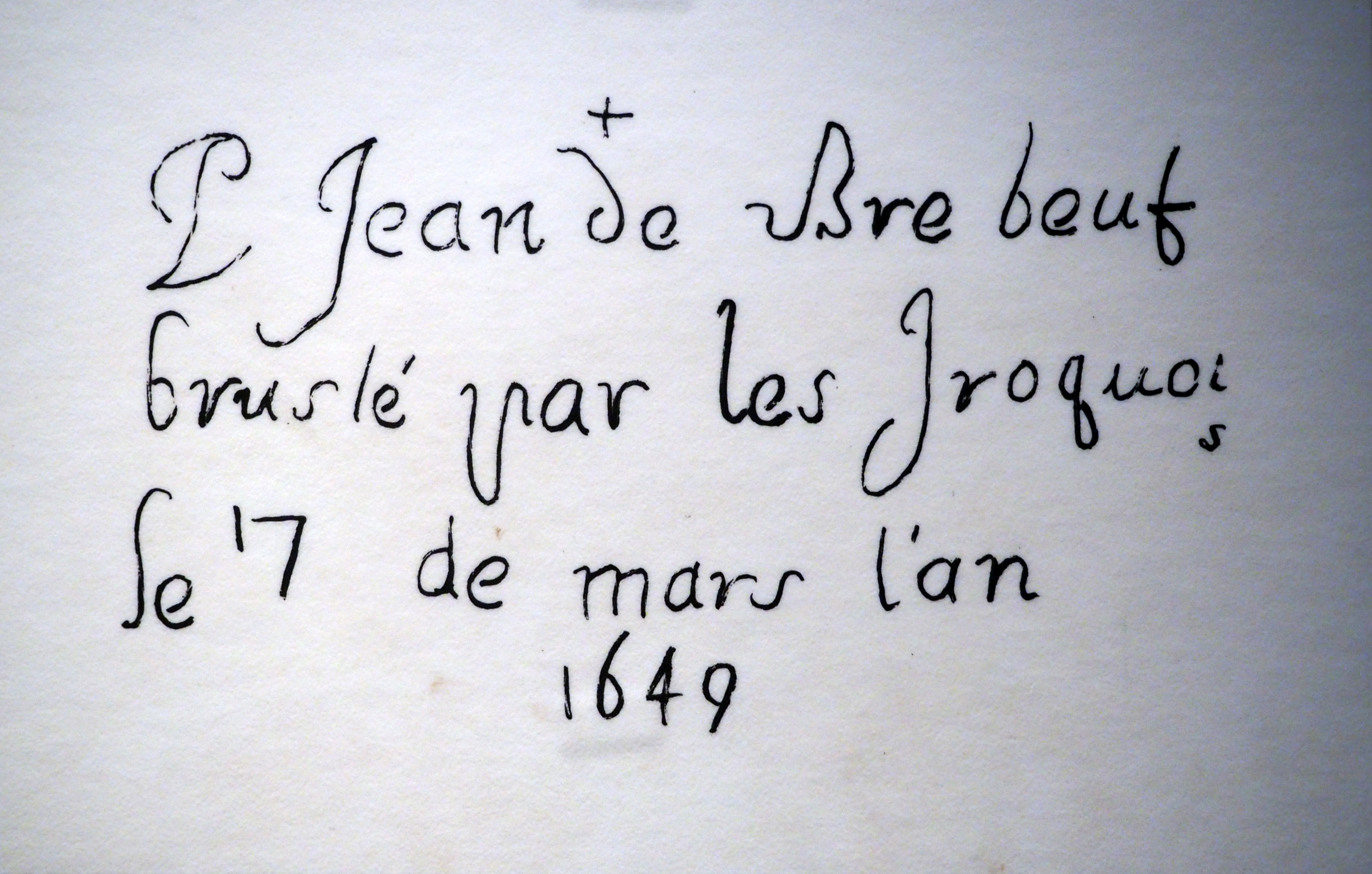 Traçage de la plaque de plomb originelle. L'inscription se lit : P. Jean de Brebeuf bruslé par les Iroquois le 17 de mars l'an 1649.